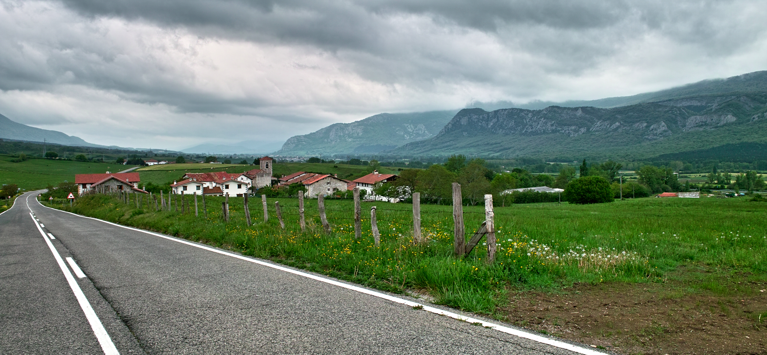 Zuhatzu (Arakil) herriaren ikuspegia.